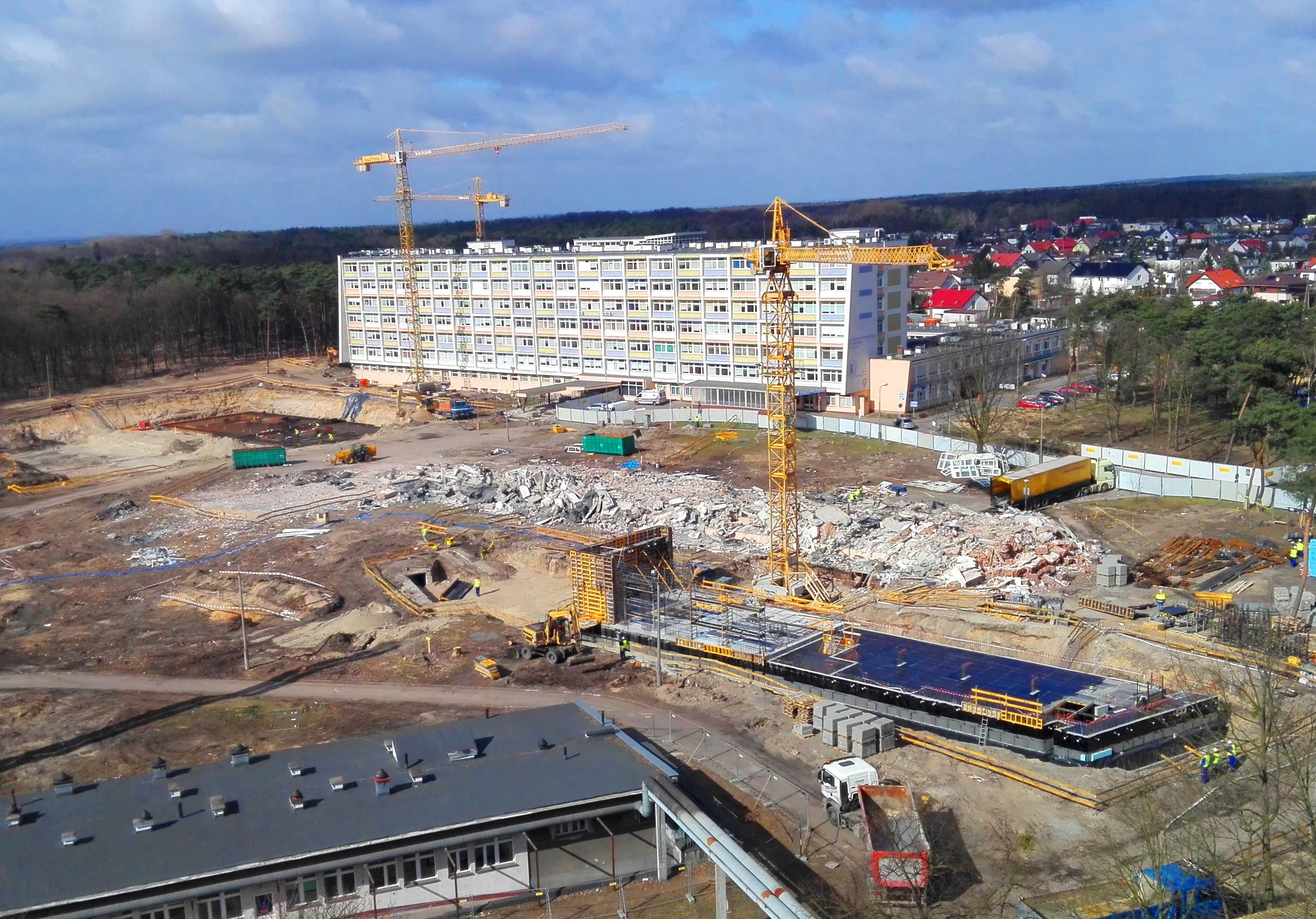 Rozbudowa WSzZ w Toruniu, marzec 2017